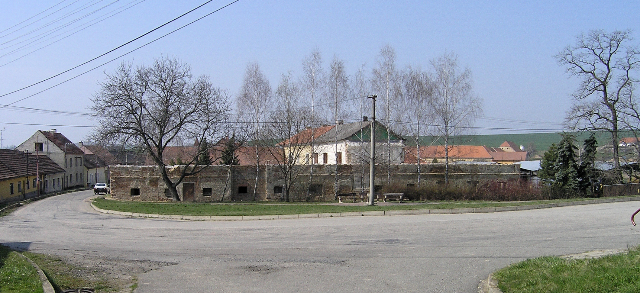 Kojátky náves, pohled na zbytky historického pivovaru.